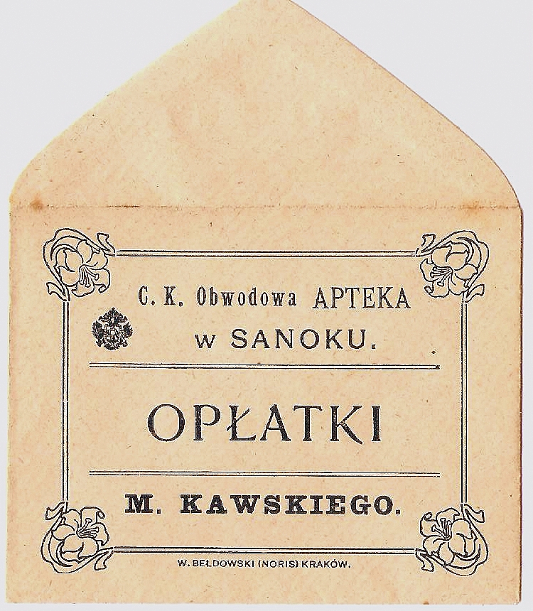 Koperty na opłatki pochodzące z C. K. Apteki Obwodowej Mariana Kawskiego w Sanoku.